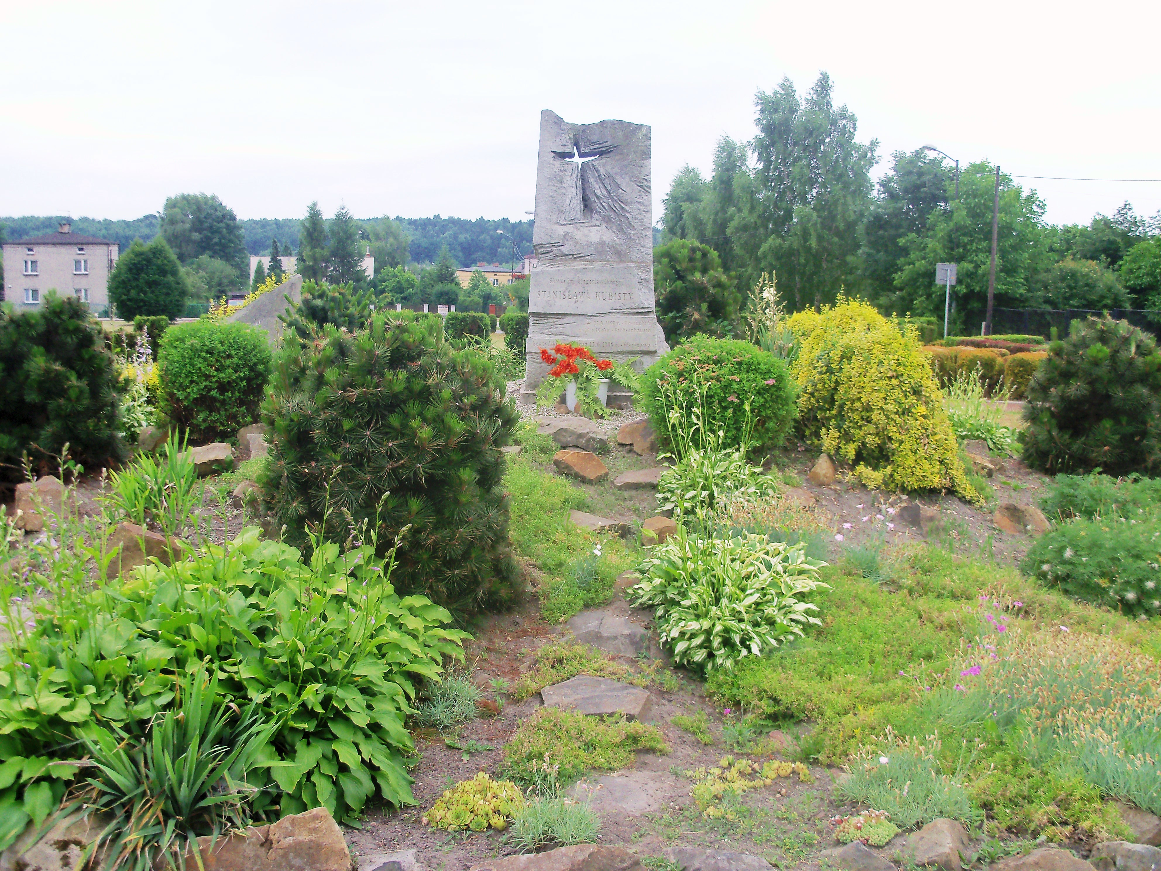 Pomnik bł. Stanisława Kubisty na skwerze S. Kubisty w Katowicach-Kostuchnie